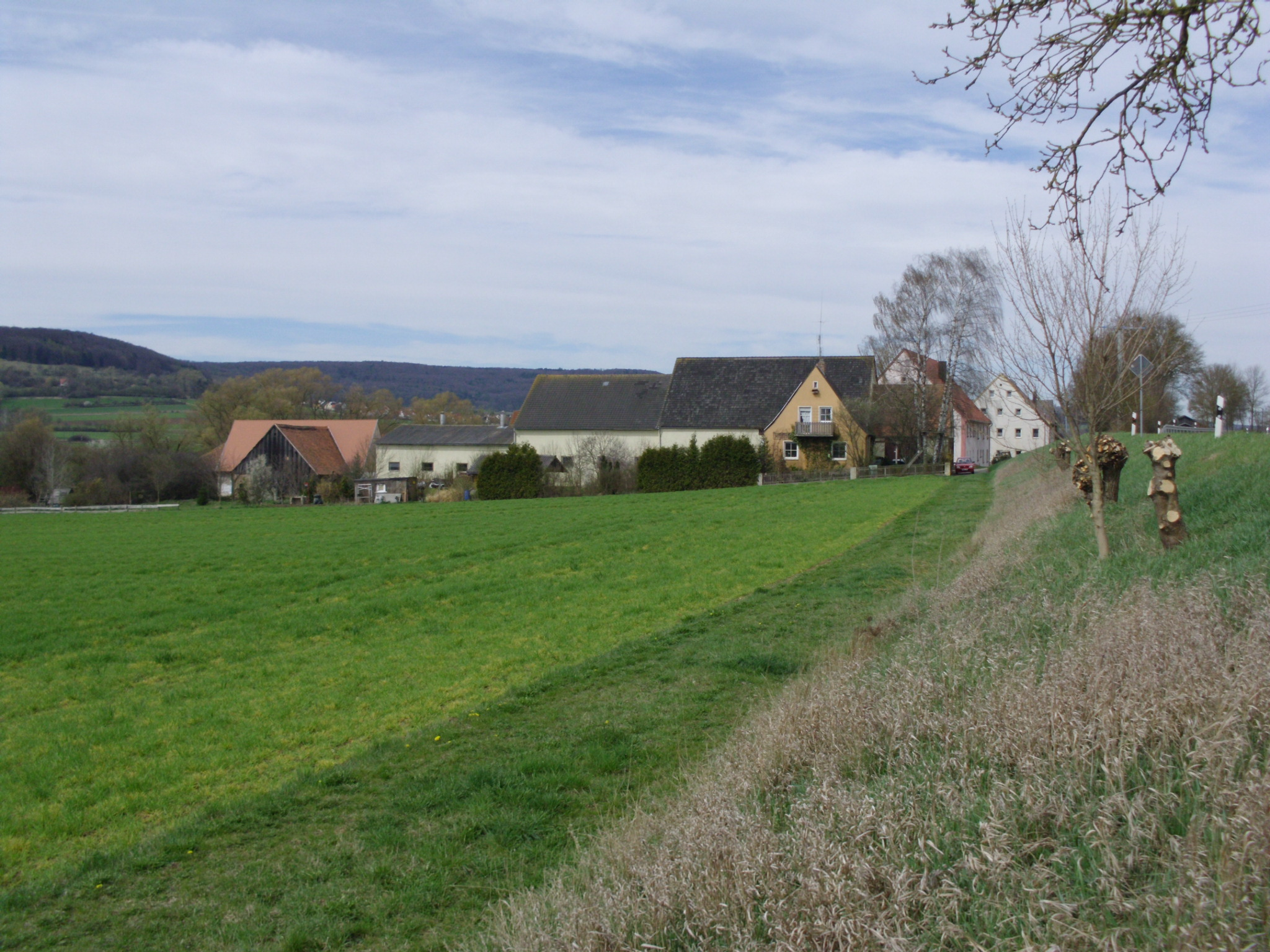 Lengenfeld, Ortsteil von Alesheim im Landkreis Weißenburg-Gunzenhausen, Bayern